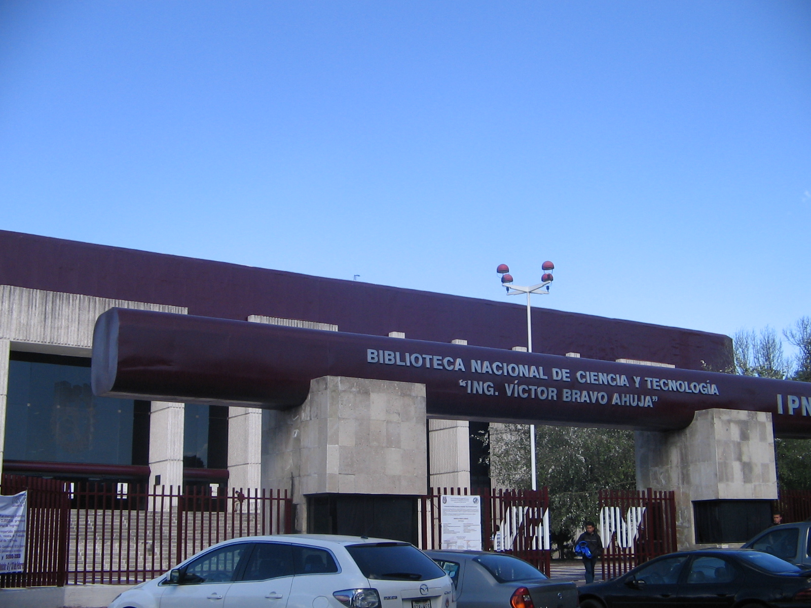 Biblioteca Nacional de Ciencia y Tecnología Ing. Víctor Bravo Ahuja del IPN